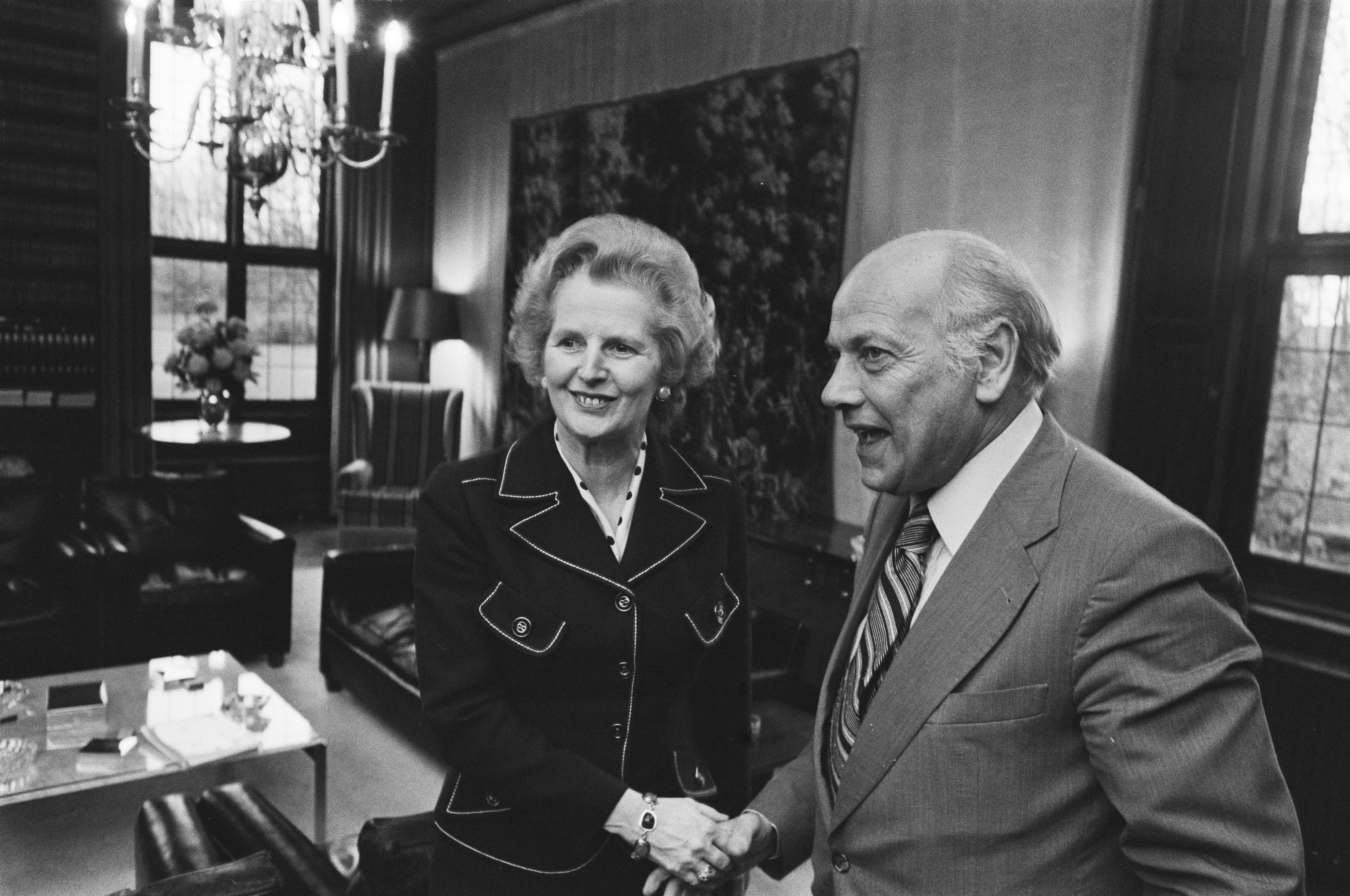 Collectie / Archief : Fotocollectie Anefo Reportage / Serie : [ onbekend ] Beschrijving : Britse oppositieleidster Margeret Thatcher bezoekt Den Uyl op Catshuis Datum : 6 december 1976 Trefwoorden : politiek Persoonsnaam : Uyl, Joop den Fotograaf : Verhoeff, Bert / Anefo Auteursrechthebbende : Nationaal Archief Materiaalsoort : Negatief (zwart/wit) Nummer archiefinventaris : bekijk toegang 2.24.01.05 Bestanddeelnummer : 928-9238